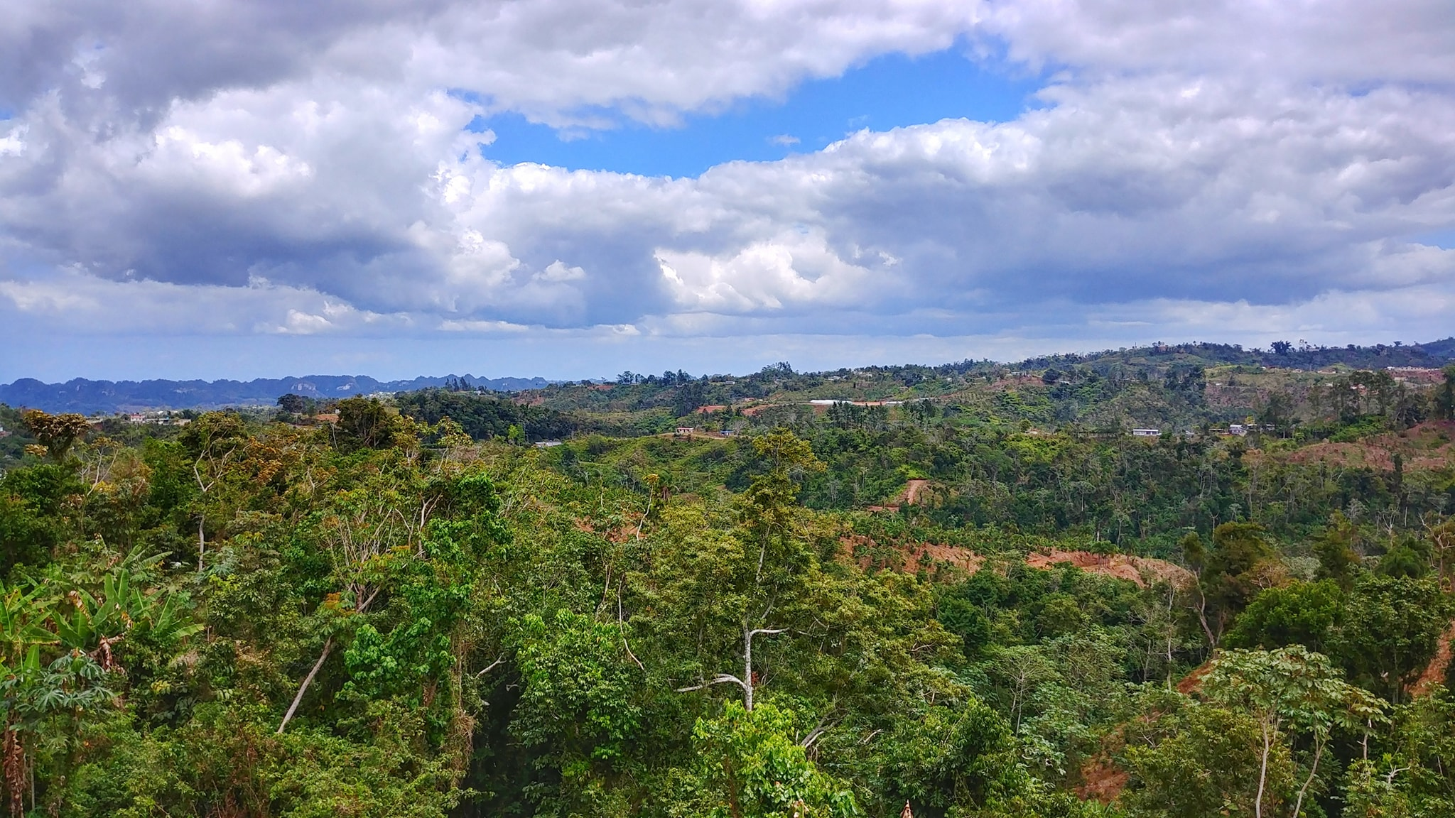 Barrio Buenos Aires, Lares, Puerto Rico (2019)